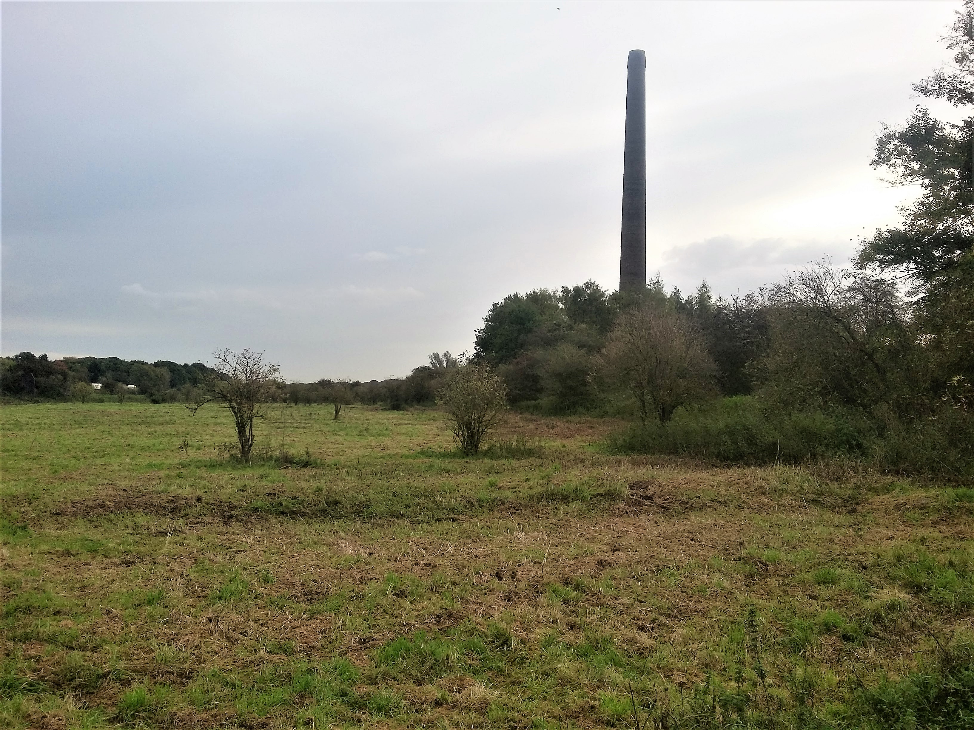 Schoorsteen bij de ruïnes van de steenfabriek (1875-1944) in de Jufferswaard bij Renkum. Eigendom Staatsbosbeheer. Oktober 2017.